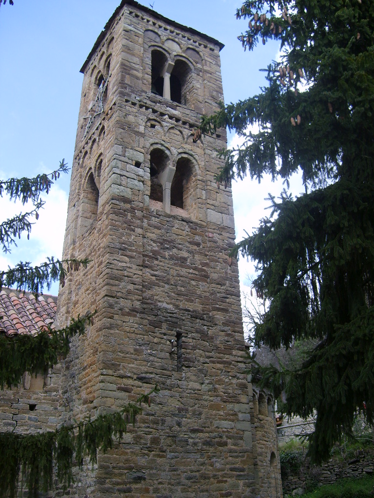 Sant Esteve de Tavèrnoles